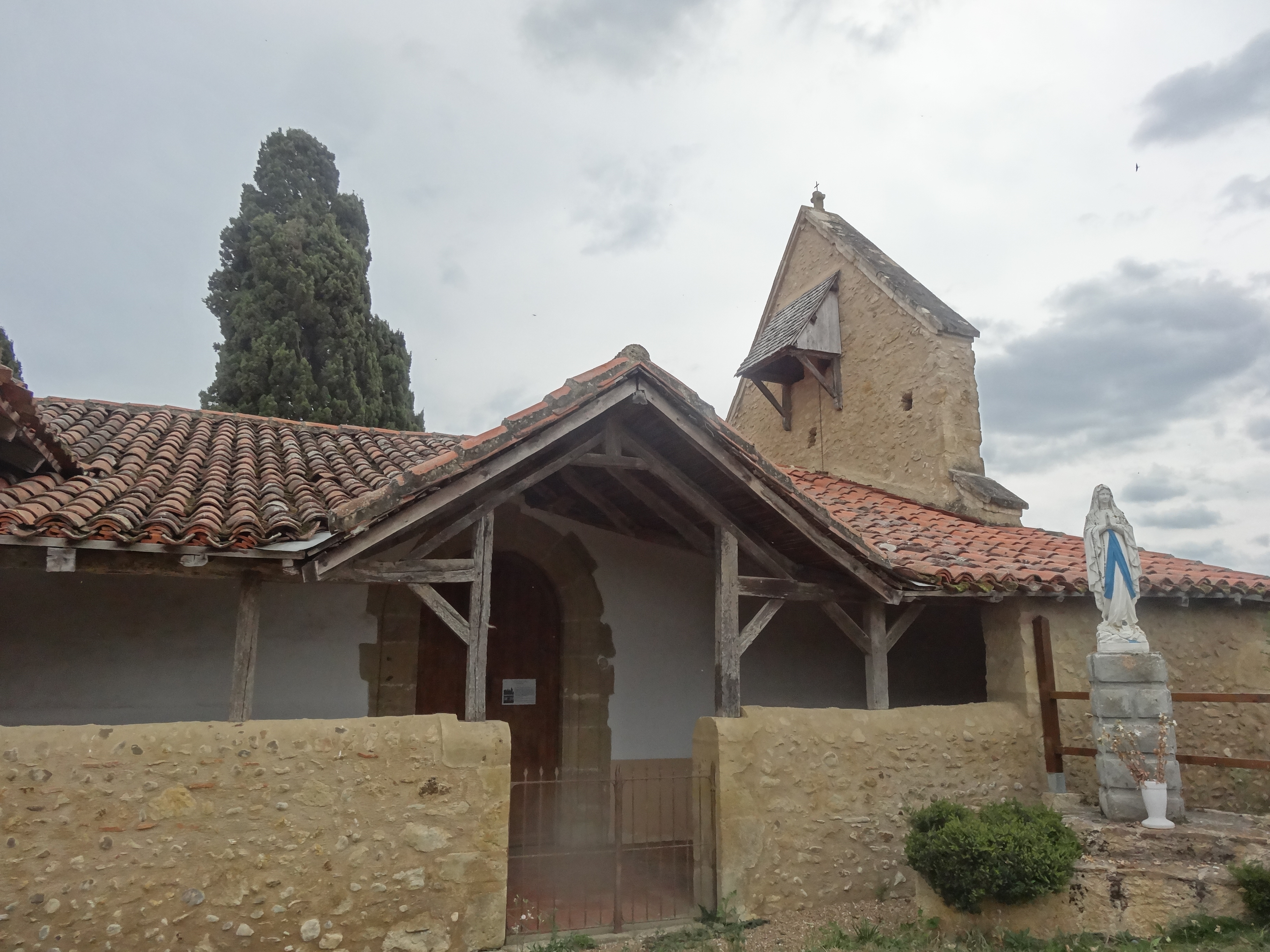 Façade nord de l'église de Saint-Jaymes.